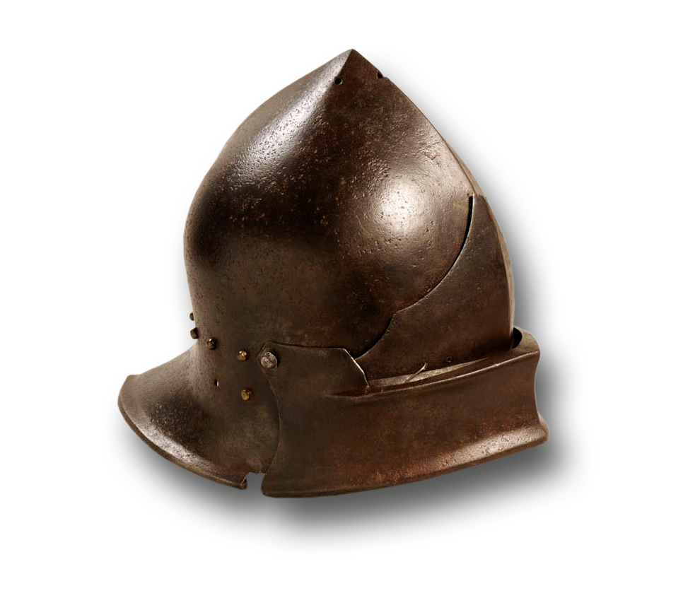 Englischer "Schaller" (Helm) aus Eisen, Coventry, Anfang 15. Jahrhundert